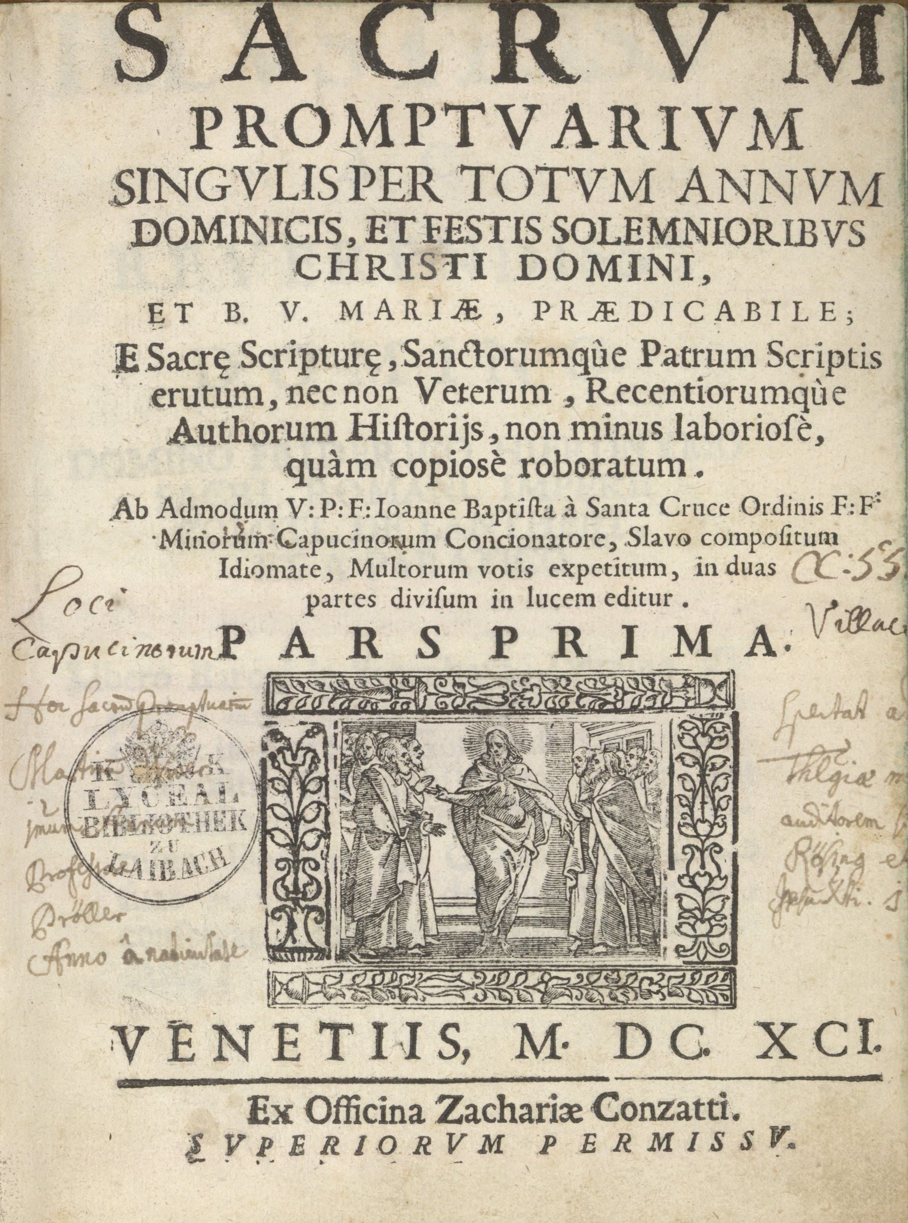 Sacrum promptiuarium.